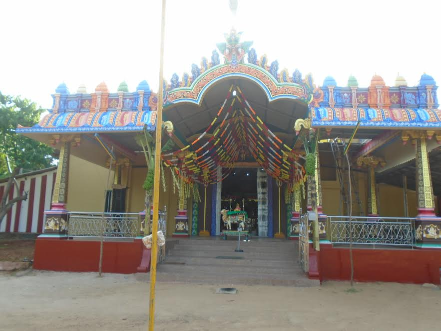 சுதுமலை ஸ்ரீமுருகமூா்த்தி ஆலயம்